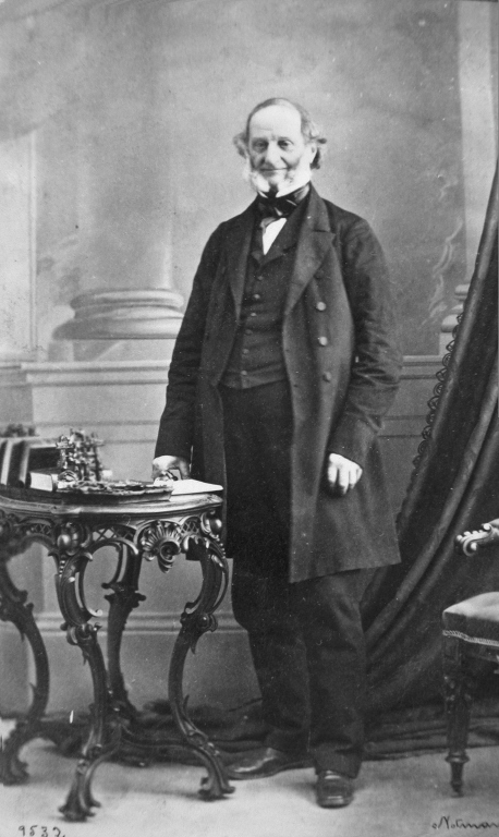 William Molson par William Notman